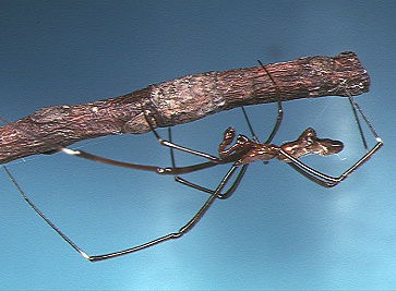 male Argyrodes kumadai from Okinawa.